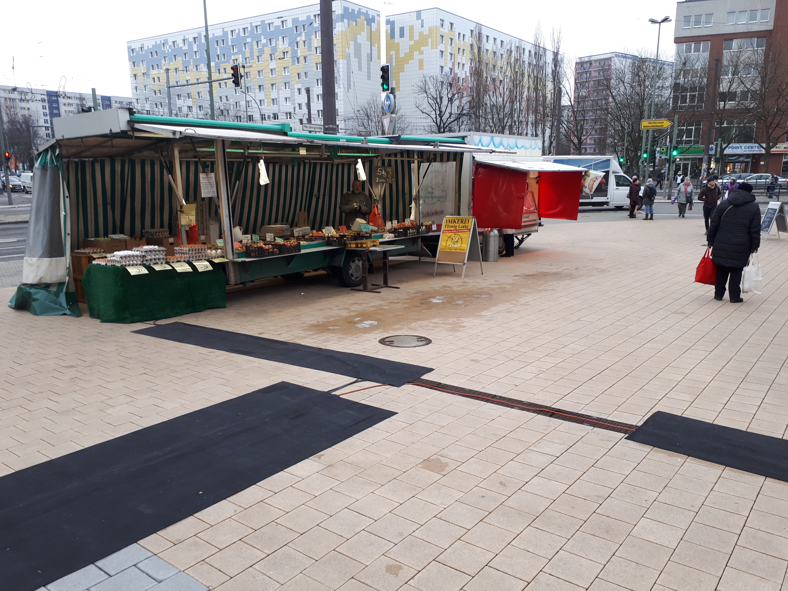 Fennpfuhl Wochenmarkt Roederplatz